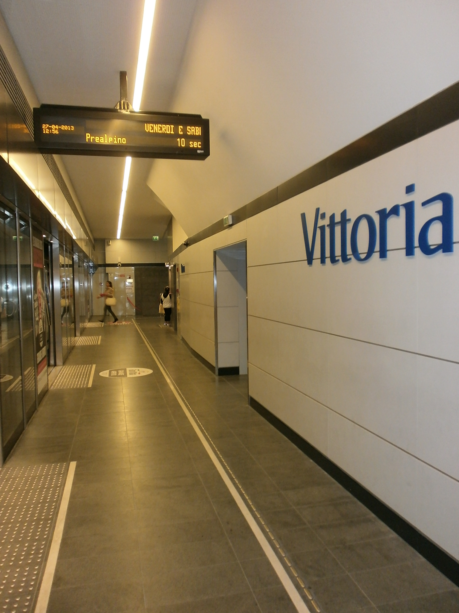 Metropolitana di Brescia - Fermata Vittoria - banchina